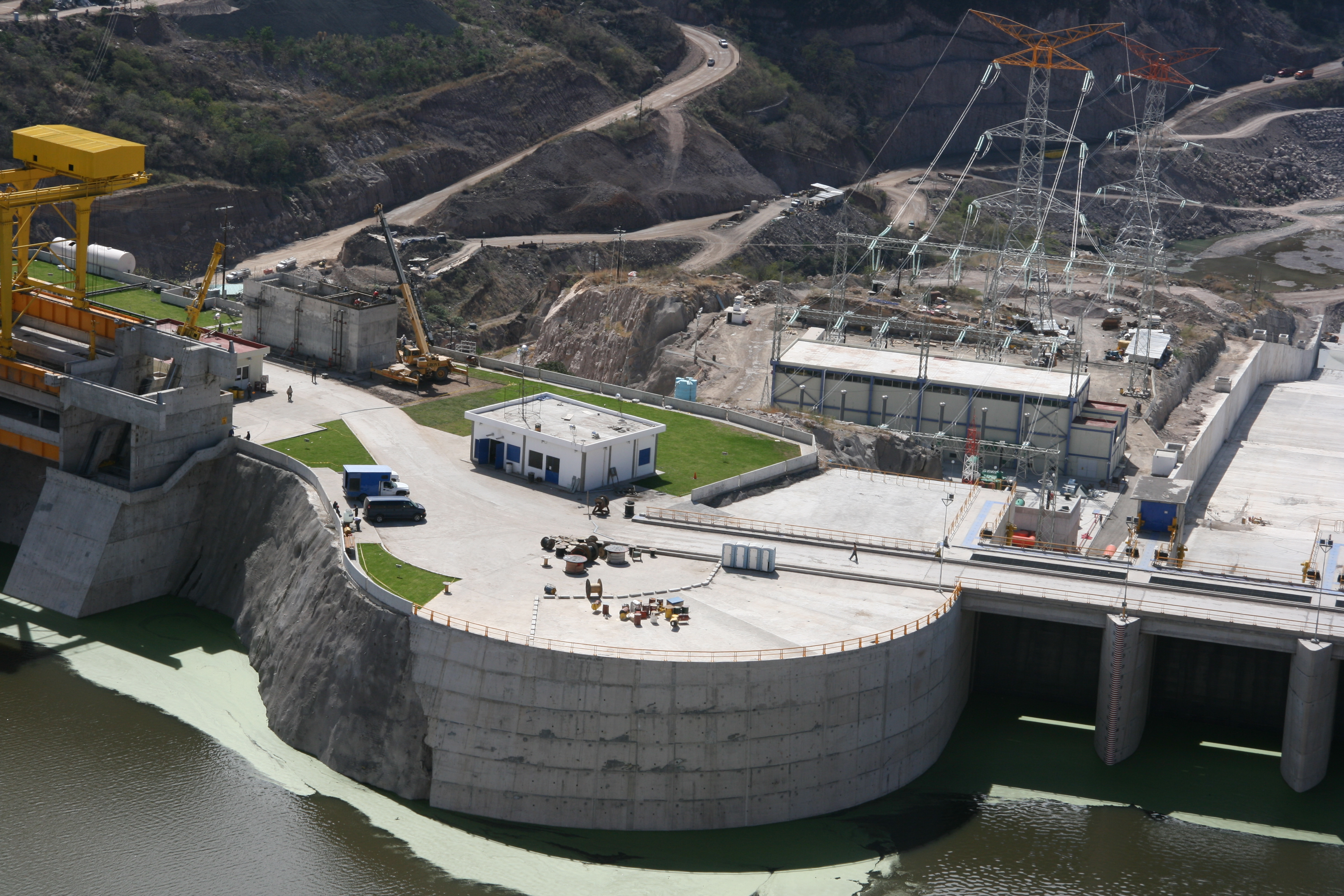 P.H. Cajón, Nayarit. Mexico. Foto aerea de la presa el Cajon.